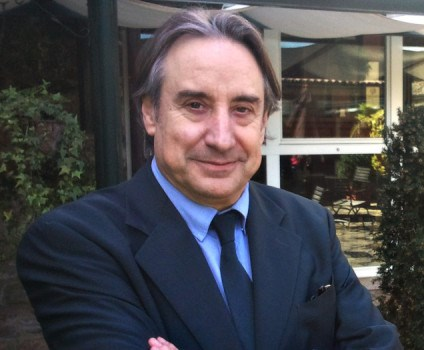 O actor Juanjo Puigcorbé nunha entrevista para Praza Pública no 2014.